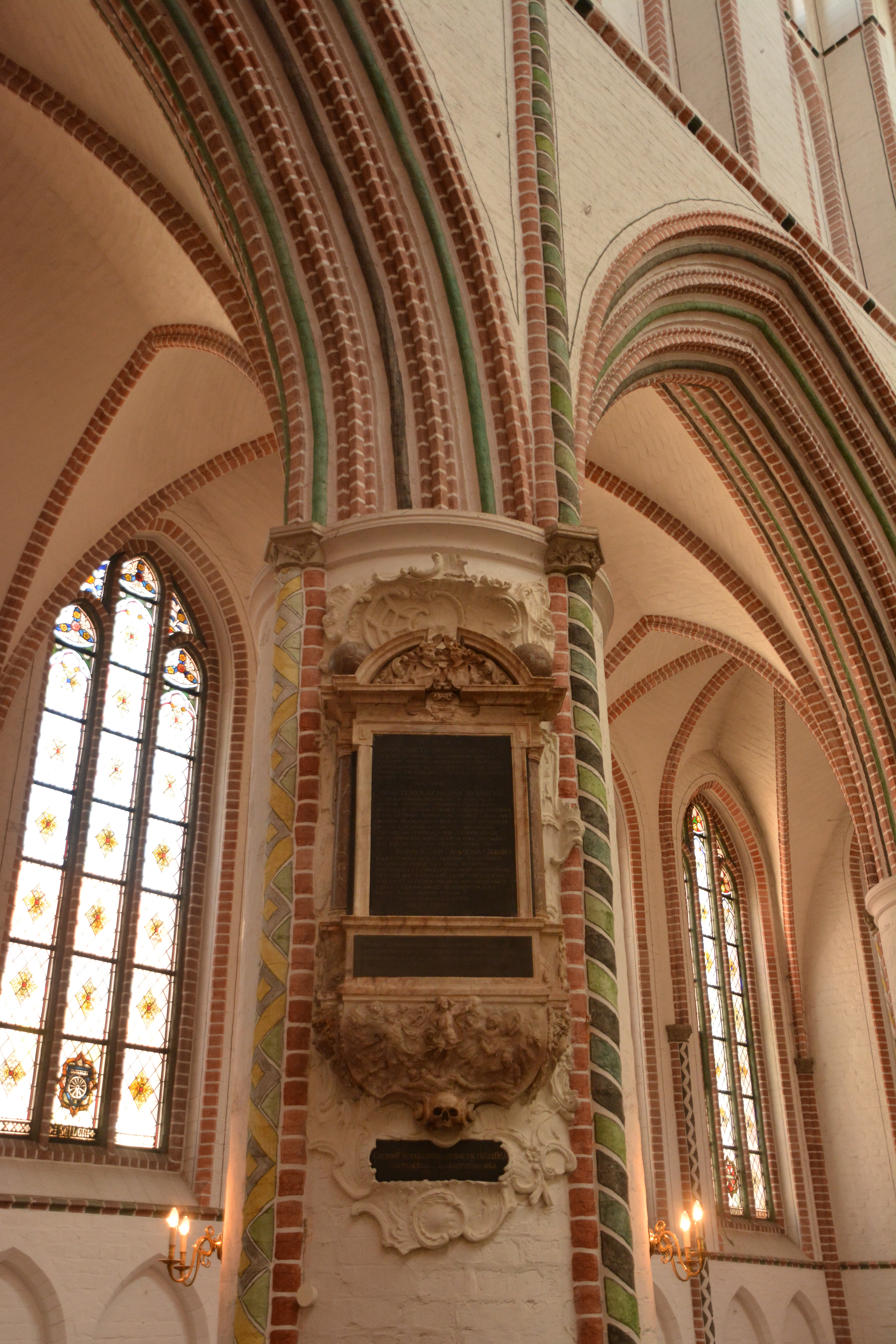 Epitaph St. Petri Buxtehude